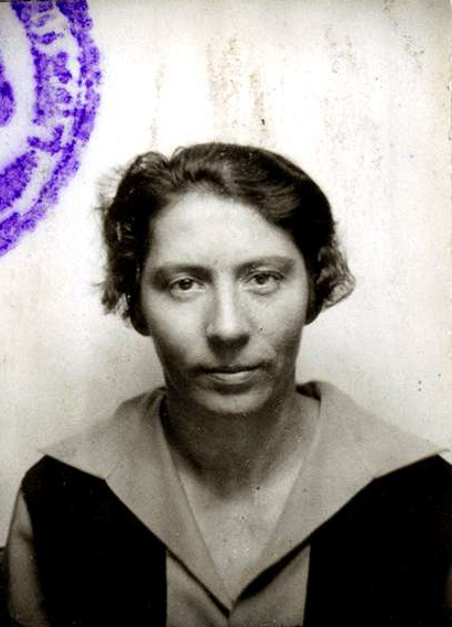 Antonie Langendorf (3. Januar 1894 in Leipzig; 23. Juni 1969 in Mannheim), deutsche Politikerin, Widerstandskämpferin gegen den Nationalsozialismus